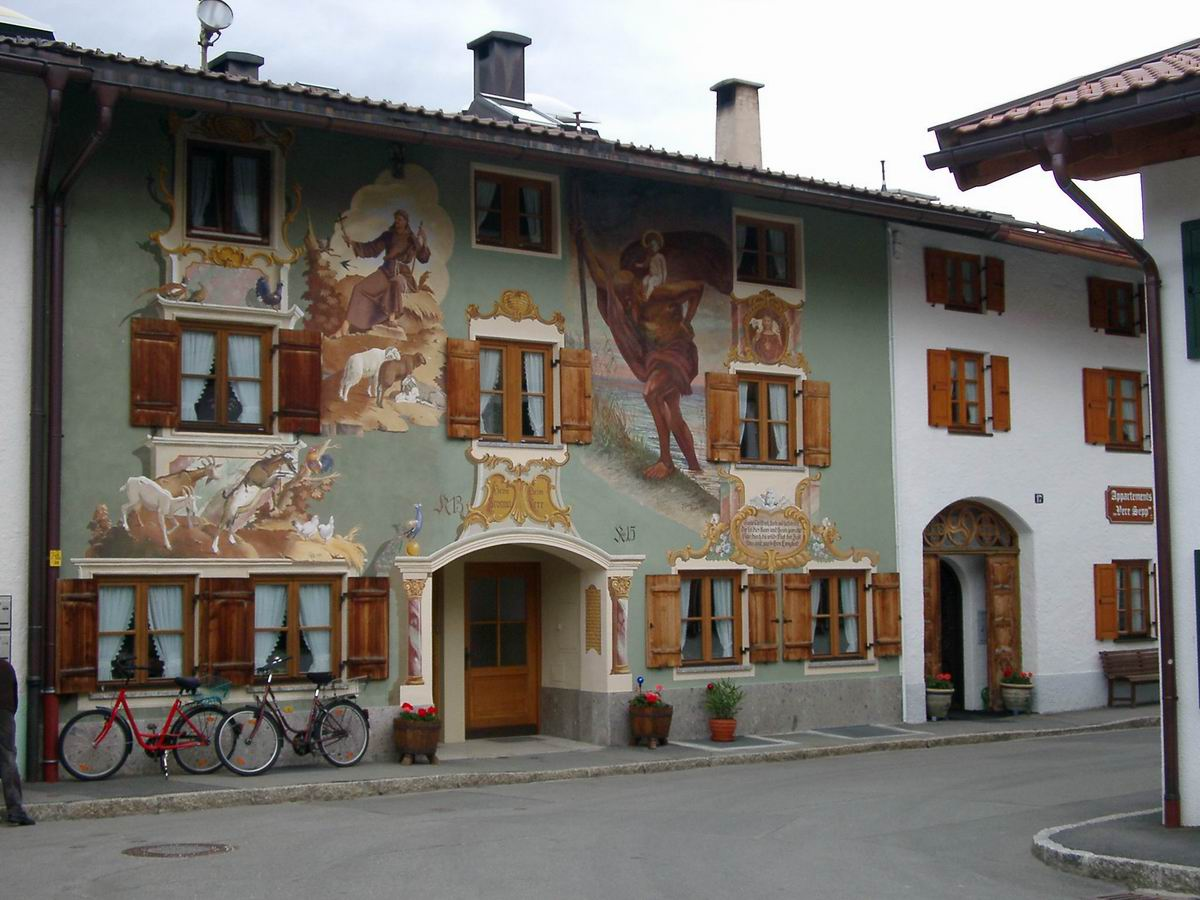 Mittenwald